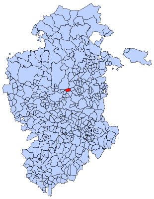 Quintanapalla en Burgos